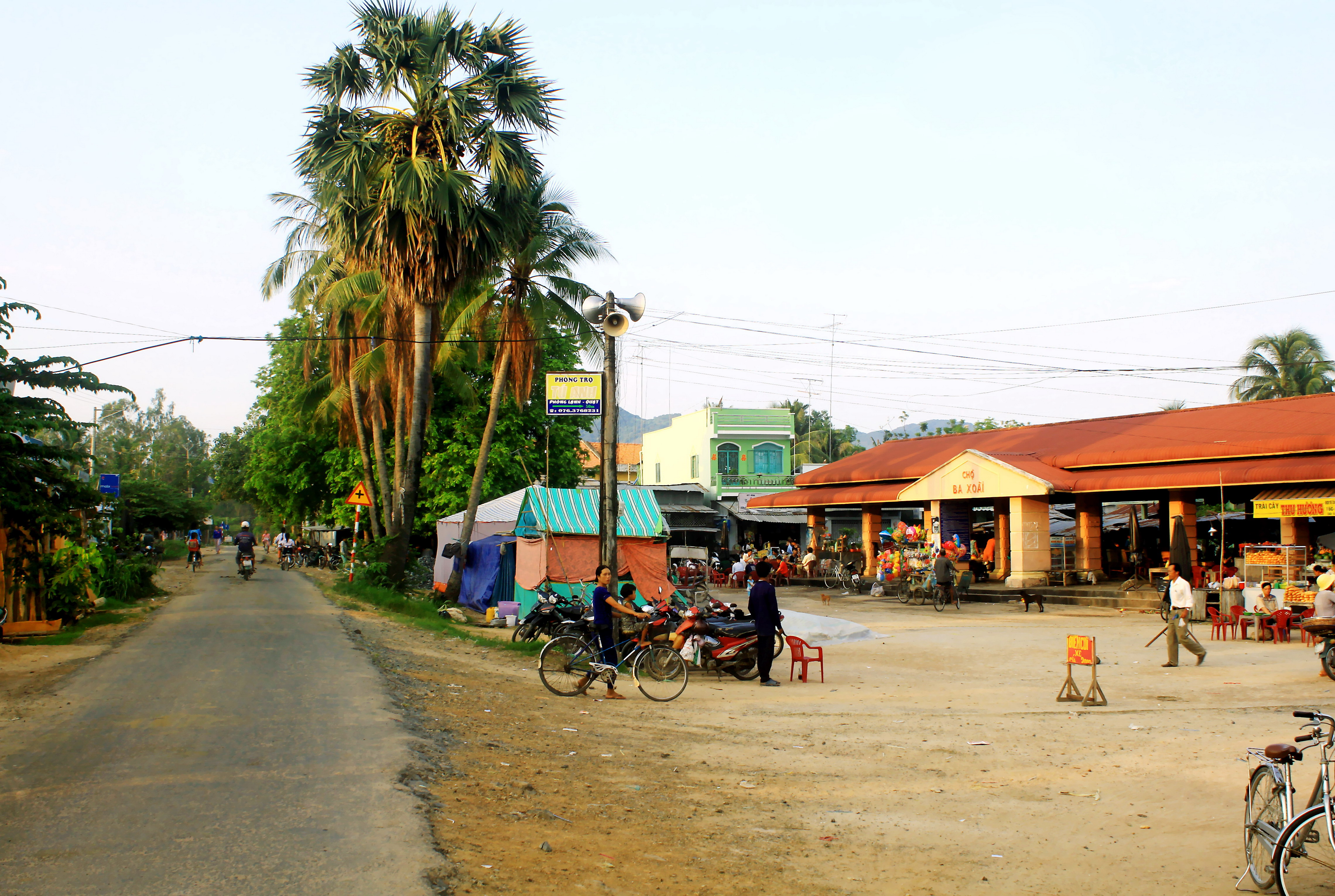 Chợ Ba Xoài ở xã An Cư, thuộc huyện Tịnh Biên, tỉnh An Giang, Việt Nam.